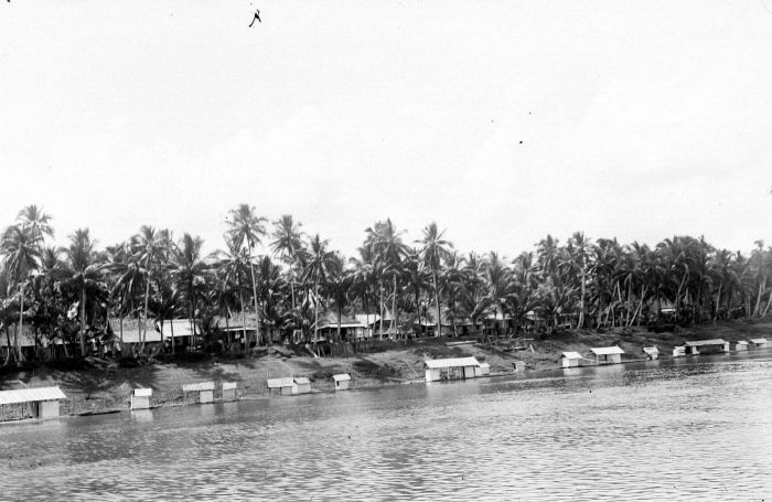 Negatief. Bad-, was- en toiletplaats langs een rivier in Jambi, Oost-Sumatra